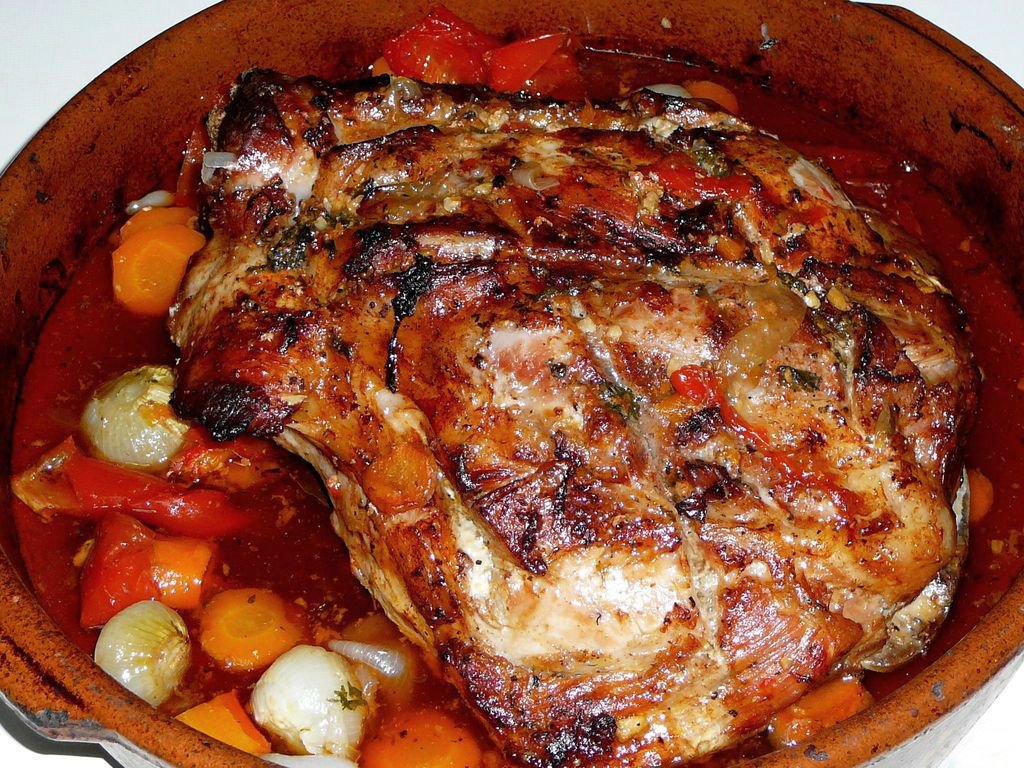 Xamón asado en Galiza